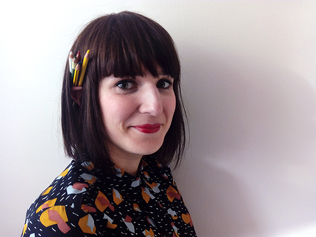 Maite Gurrutxaga ilustratzailea